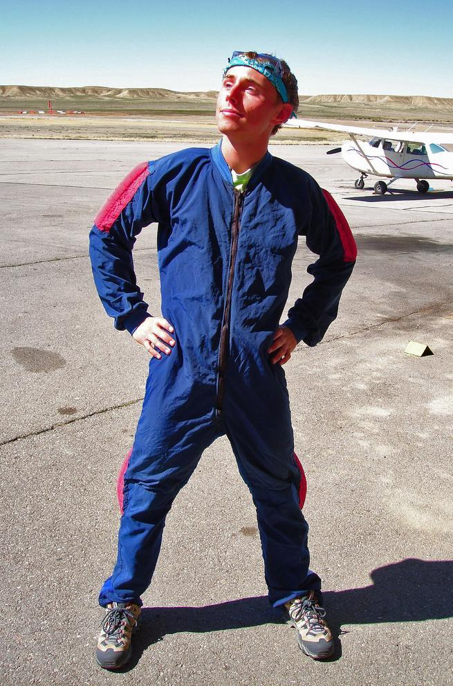 A man in a jumpsuit